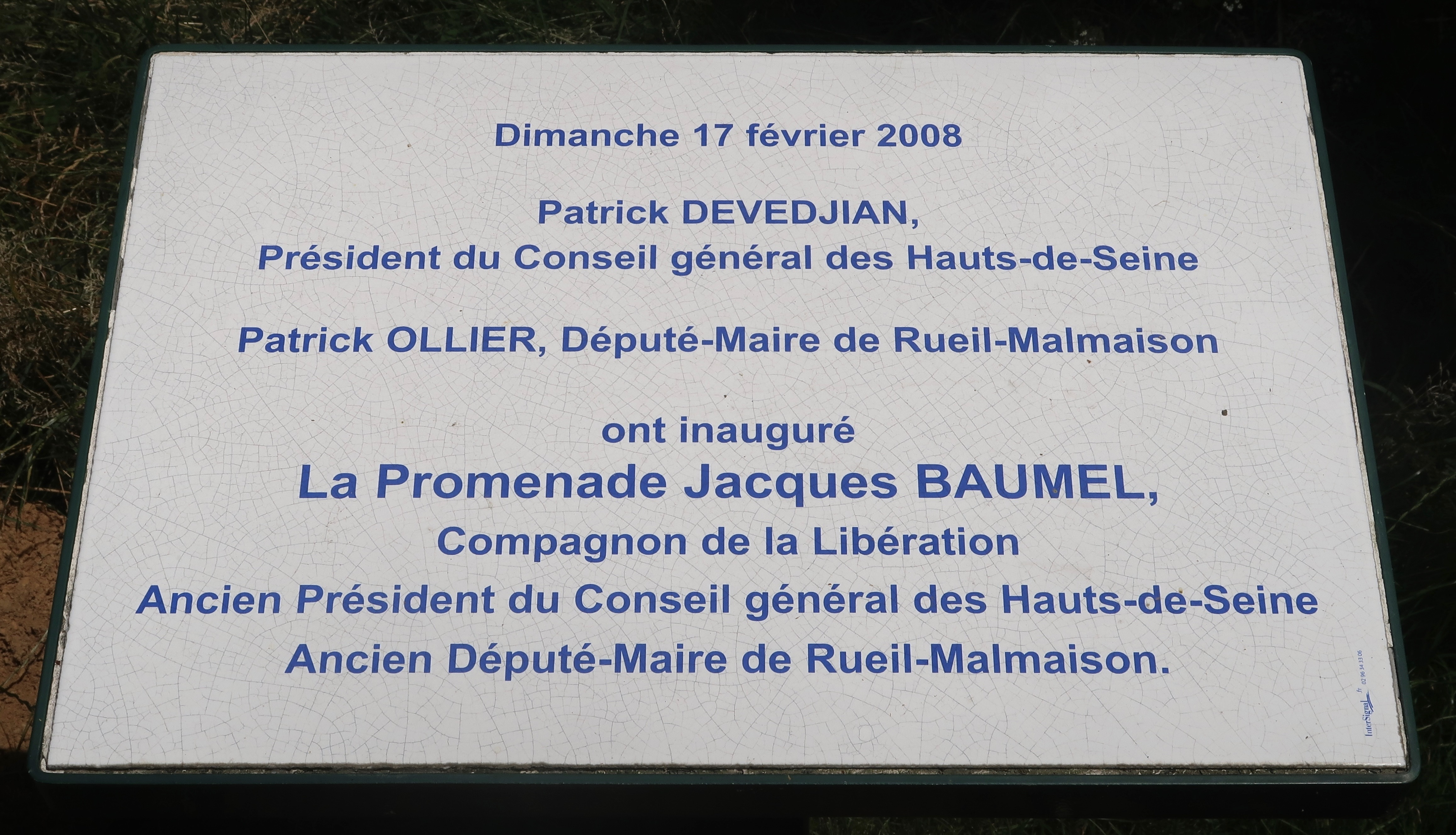 Plaque en hommage à Jacques Baumel sur la promenade du parc départemental du mont-Valérien.